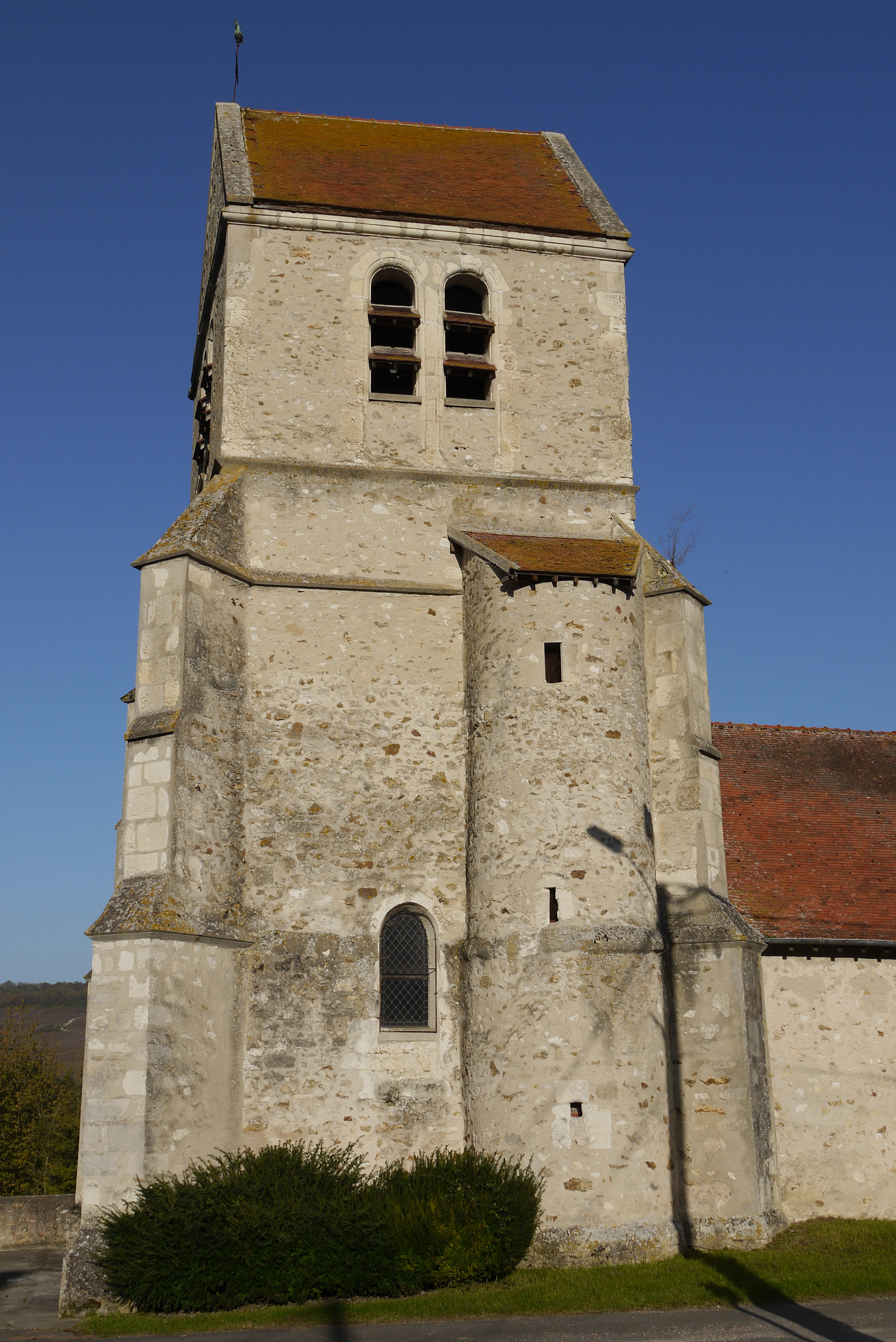 L'église Saint-Blaise de Reuilly-Sauvigny